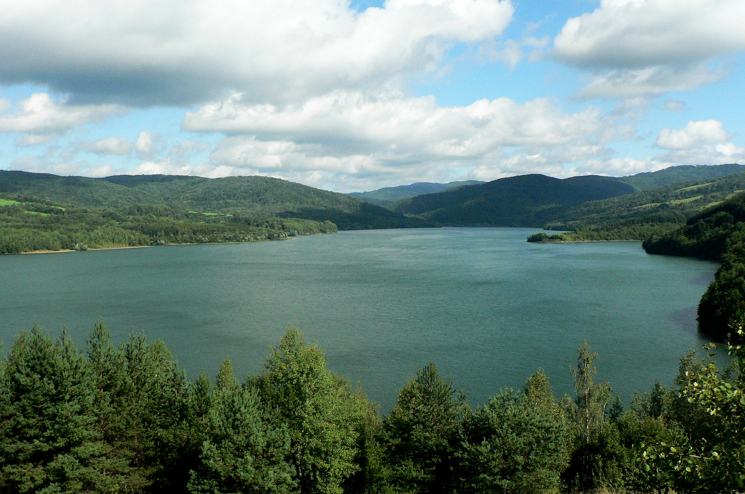 VN Starina